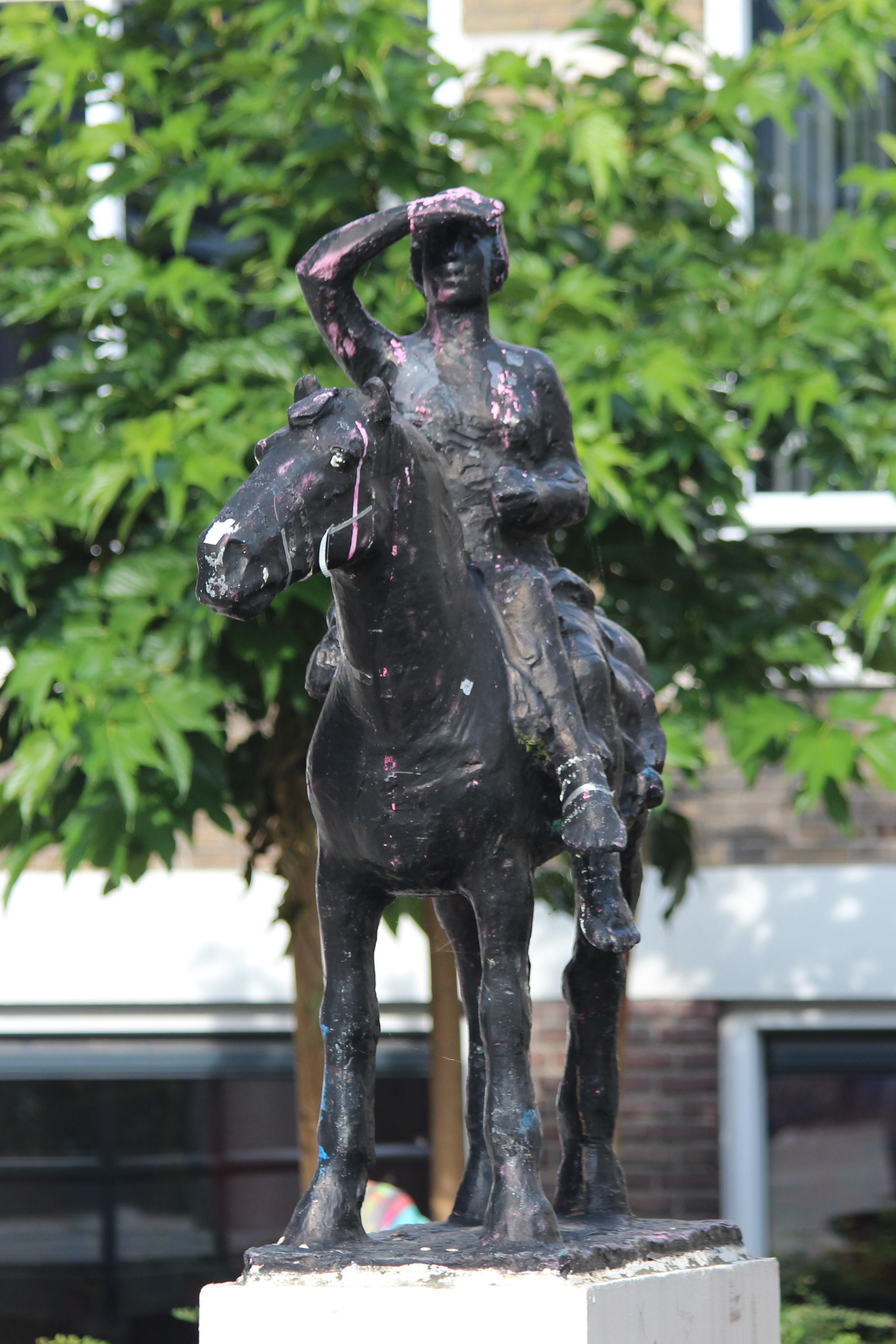 Frank Letterie - Amazone - 1964, schoolplein Kagerstraat in Leiden